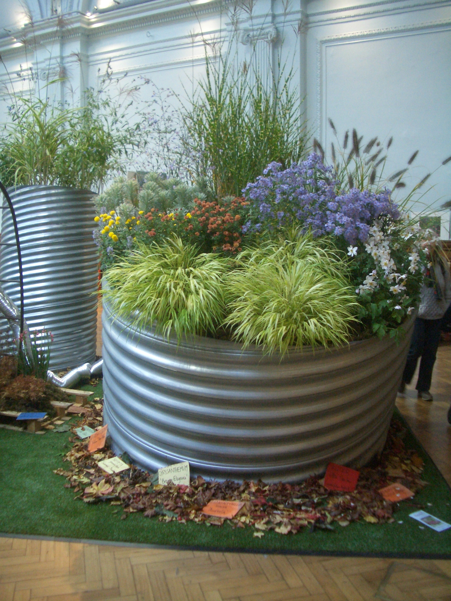 Cloudy Bay Discovery Garden als Oxo Tower Remix Garden in der RHS Shades of Autumn Show, Oktober 2013. RHS und CityScapes